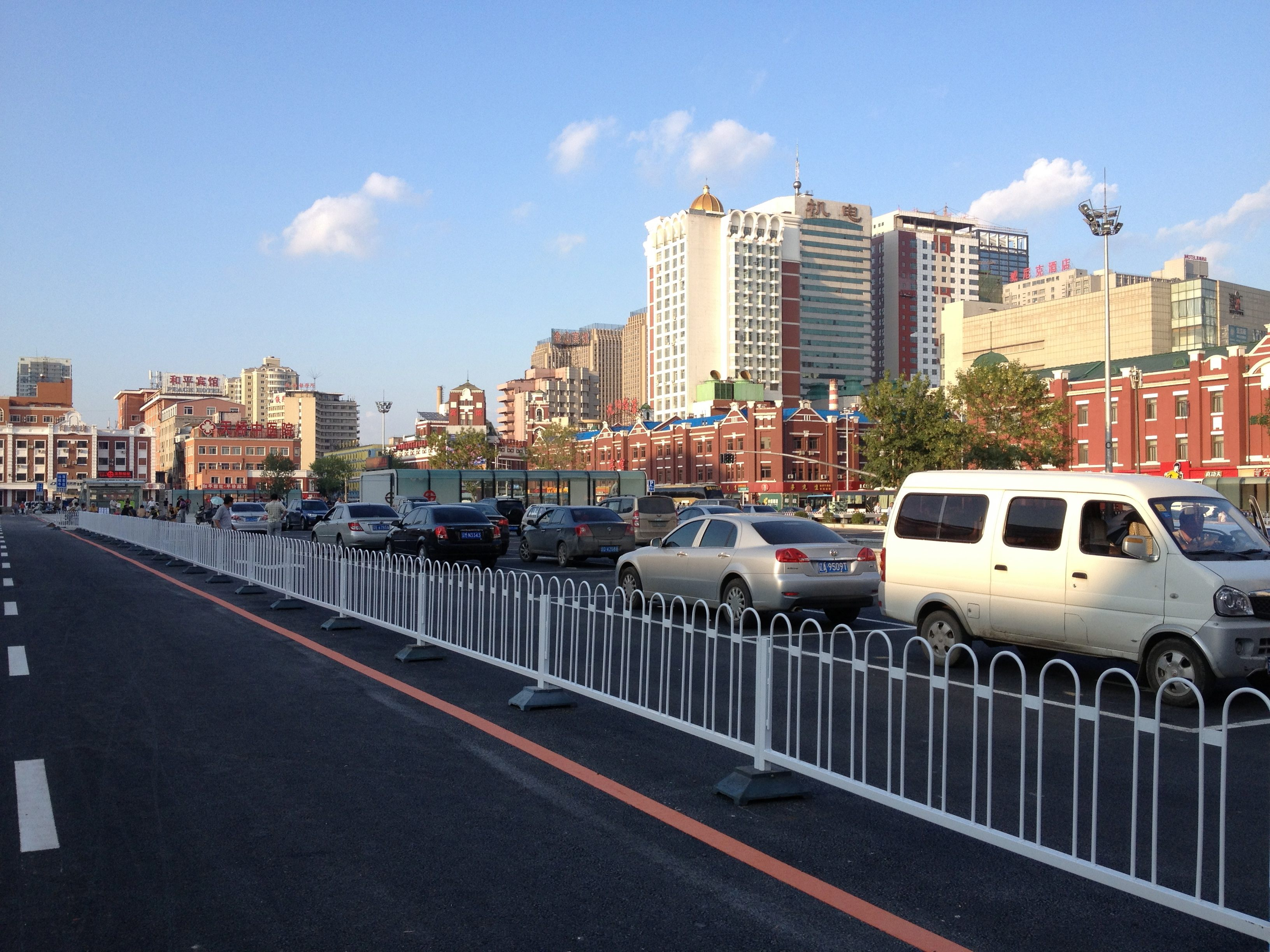 中文（中国大陆）: 沈阳站东广场